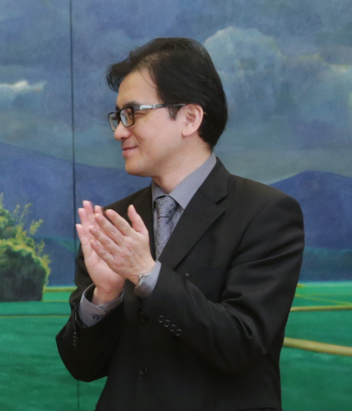 中華民國總統府代理秘書長劉建忻。 授權方式及範圍：中華民國總統府│政府網站資料開放宣告 Authorization Method & Scope: Office of the President, Republic of China (Taiwan) | Government Website Open Information Announcement